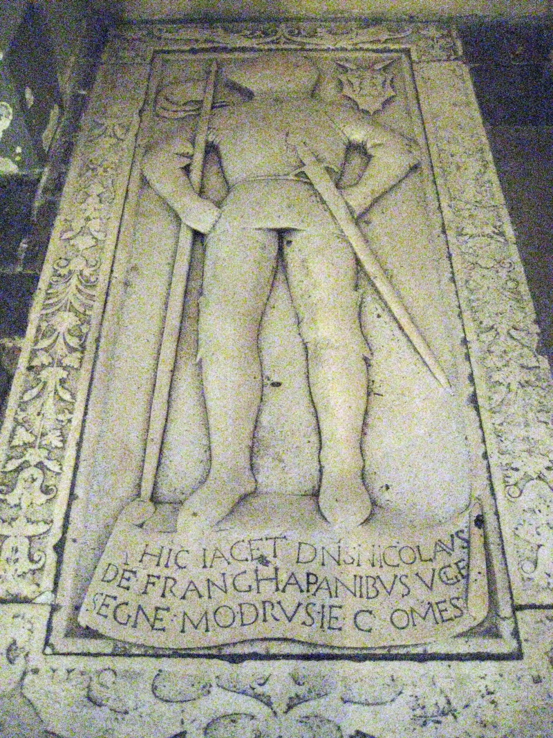 Unutrašnjost crkve Gospe Trsatske. Grob krčkog kneza Nikole VI. Frankopana (*oko 1458 - †1523), unuka Nikola IV. Frankopana, hrvatskog bana, u crkvi Gospe Trsatske u Rijeci. Latinski natpis kaže: Ovdje počiva , župana senjsko-modruškog (Latinski natpis kaže: Ovdje počiva gospodin Nikola Frankapan krčko-senjsko-modruški knez)., Rijeka